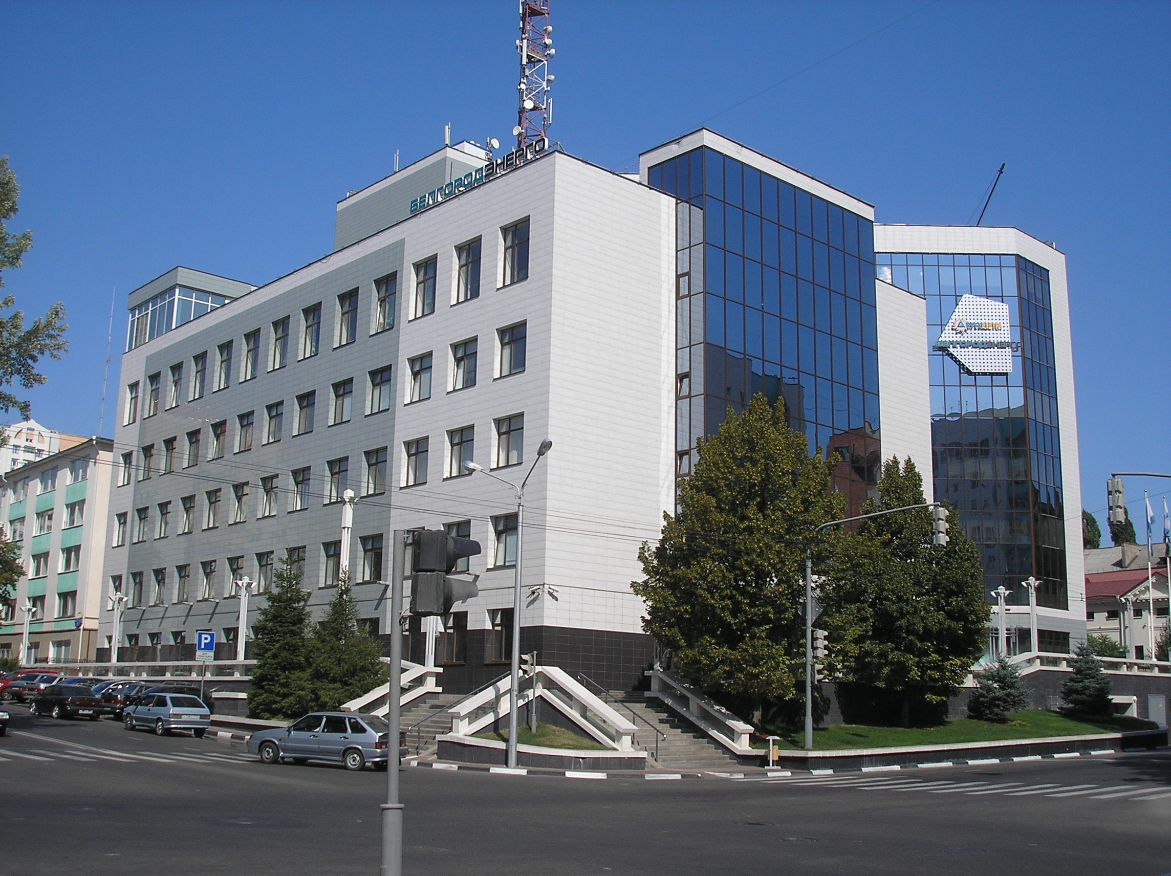 Главный офис Белгород Энерго